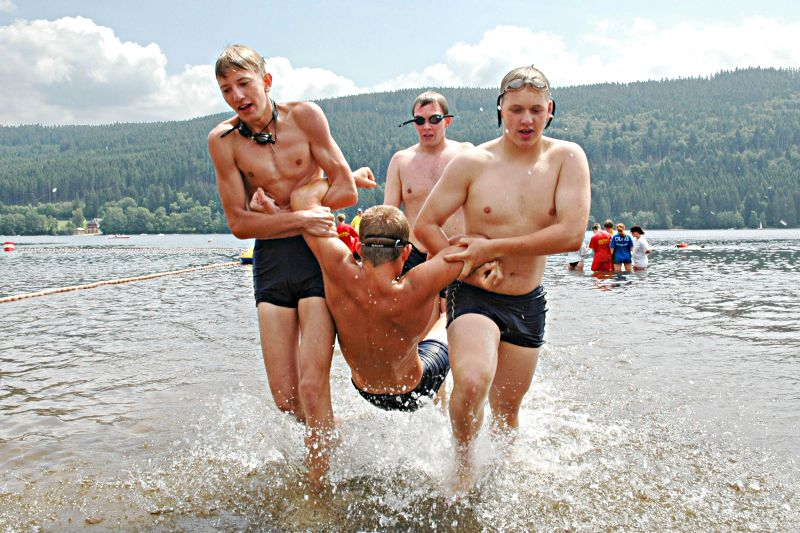 Rettungsschwimmen: Rettungsschwimmen verlangt Teamarbeit, wie hier bei der Disziplin Rescue Tube Rescue Race bei Freigewässerwettkämpfen im Rettungsschwimmen. Aufgenommen beim Breisgau Open Water Rescue Cup 2004 der DLRG am Titisee. (Original text : Rettungsschwimmen verlangt Teamarbeit. Die Disziplin Rescue Tube Rescue Race bei Freigewässerwettkämpfen im Rettungsschwimmen.) Kamera: Nikon D70 Software: GIMP